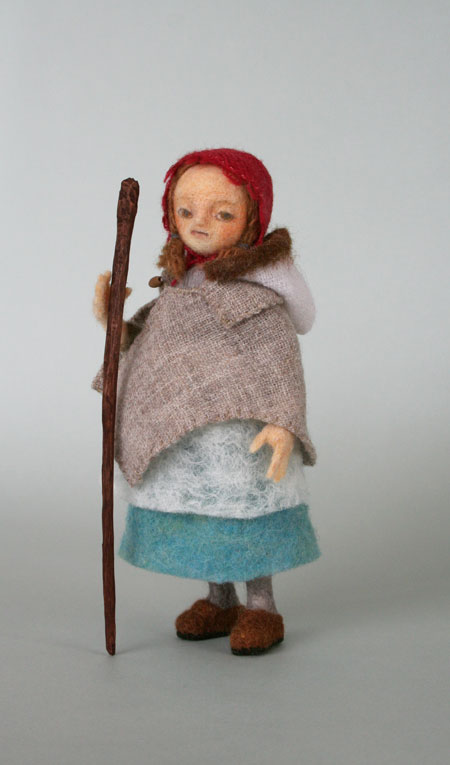 草地を求めて移動する厳しさを物語るような、その風情。 そして凛としたその女性の姿。